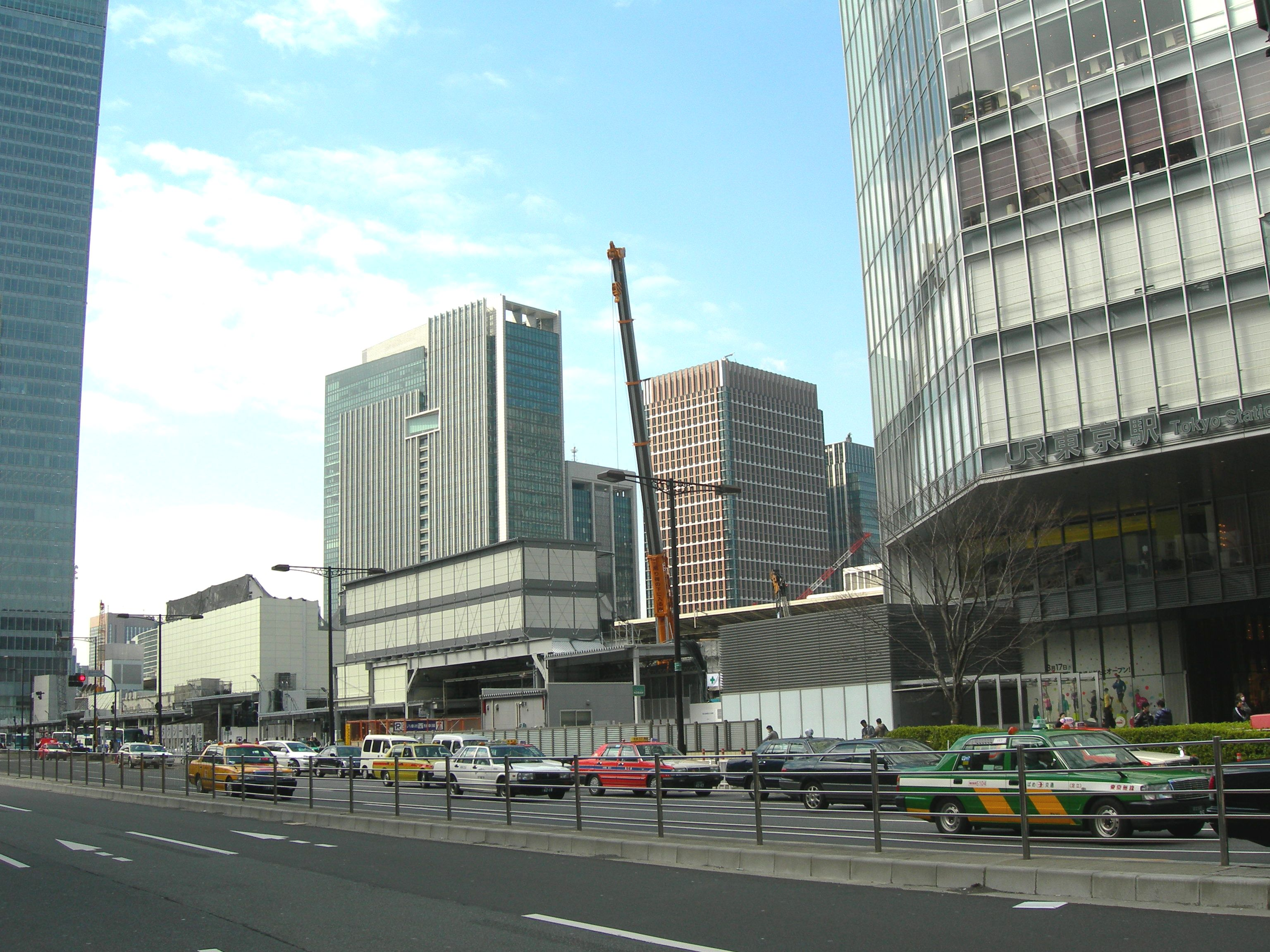 東京駅八重洲口鉄道会館ビル解体後